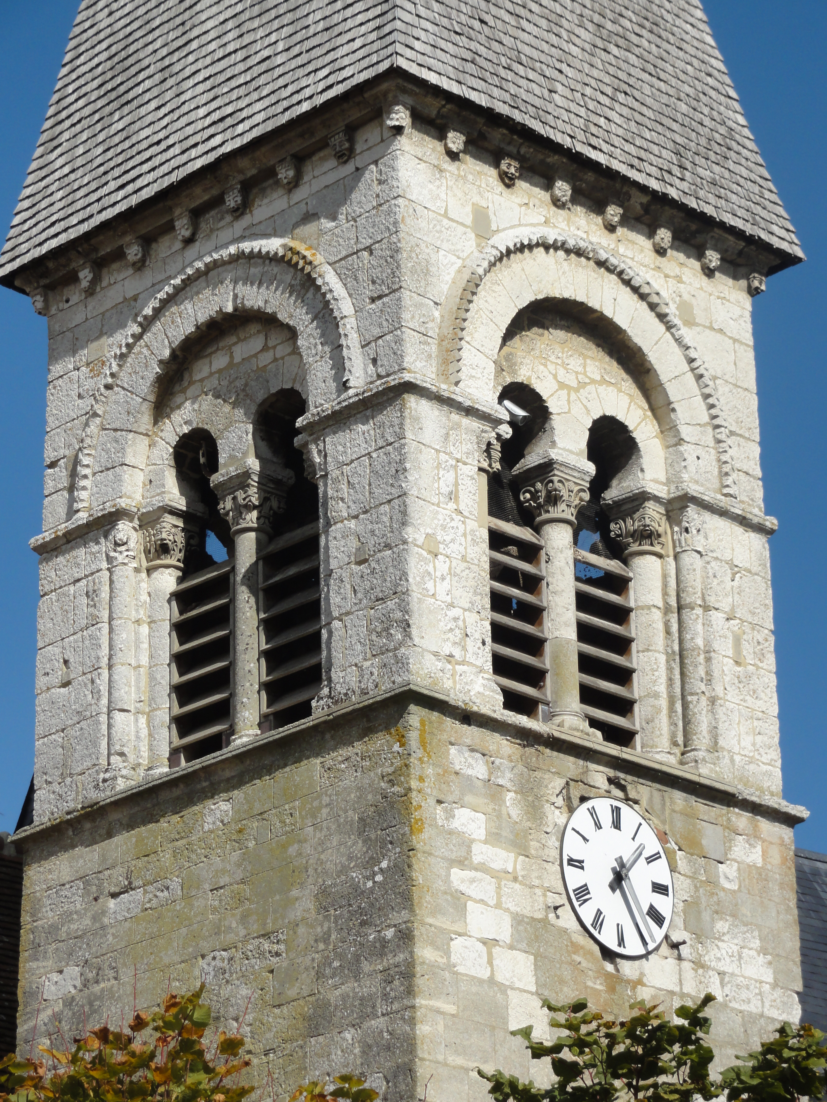 Église Saint-Lucien de Warluis - voir titre.